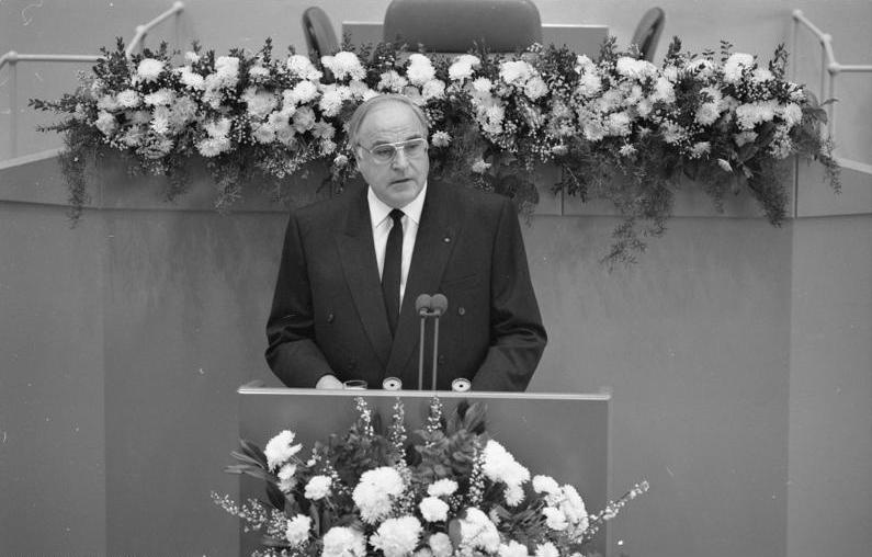 Bonn, 12. Januar 1990 Trauerstaatsakt für den am 31.12.1989 verstorbenen ehemaligen Bundesminister Dr. Gerhard Schröder. In Anwesenheit des Bundespräsidenten, des Präsidenten des Bundesverfassungsgerichts und von Mitgliedern der Bundesregierung, des Bundestages und des Bundesrates würdigten Bundestagspräsidentin Prof. Rita Süssmuth, Bundeskanzler Dr. Helmut Kohl und der frühere Bischof Dr. D. Hermann Kunst das politische Lebenswerk des Verstorbenen.